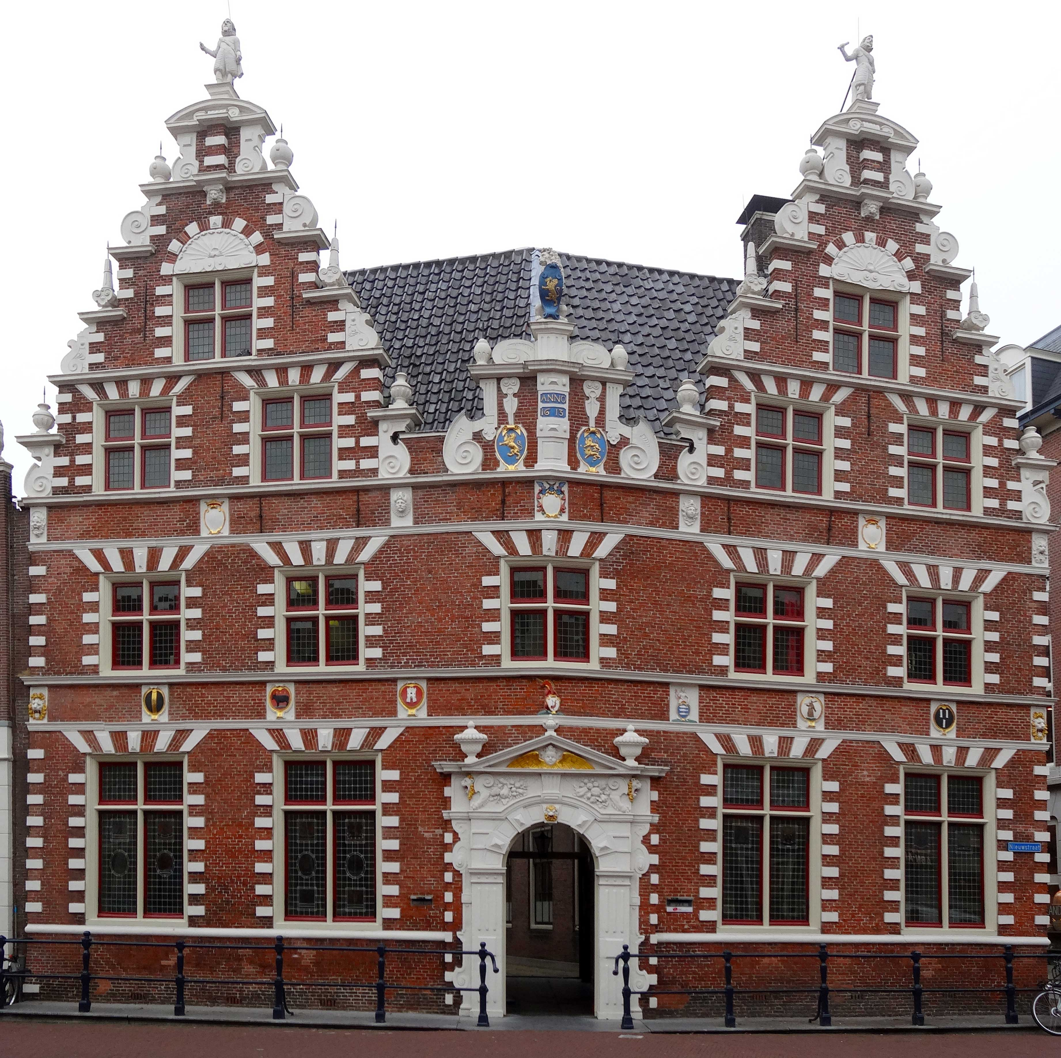 Voormalig Statenlogement en voormalig stadhuis van Hoorn